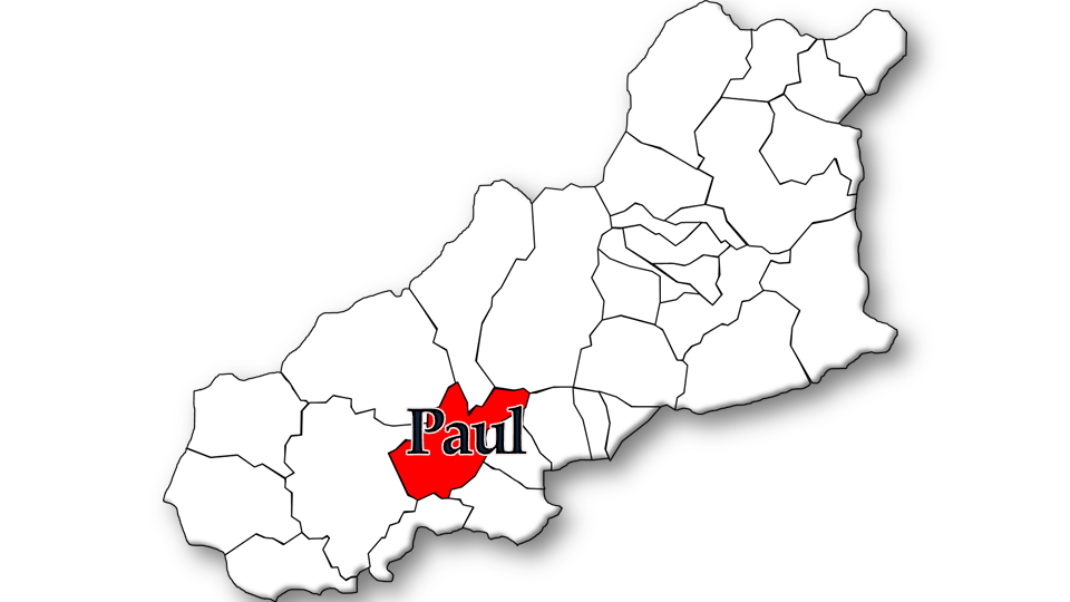 População